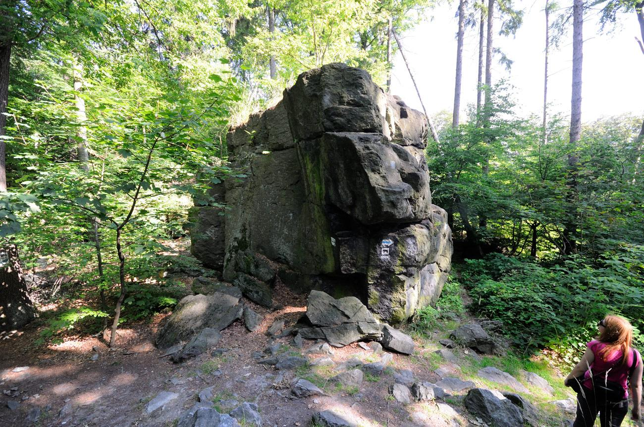 Skała na szlaku niebieskim i szlaku niedźwiedzia :)